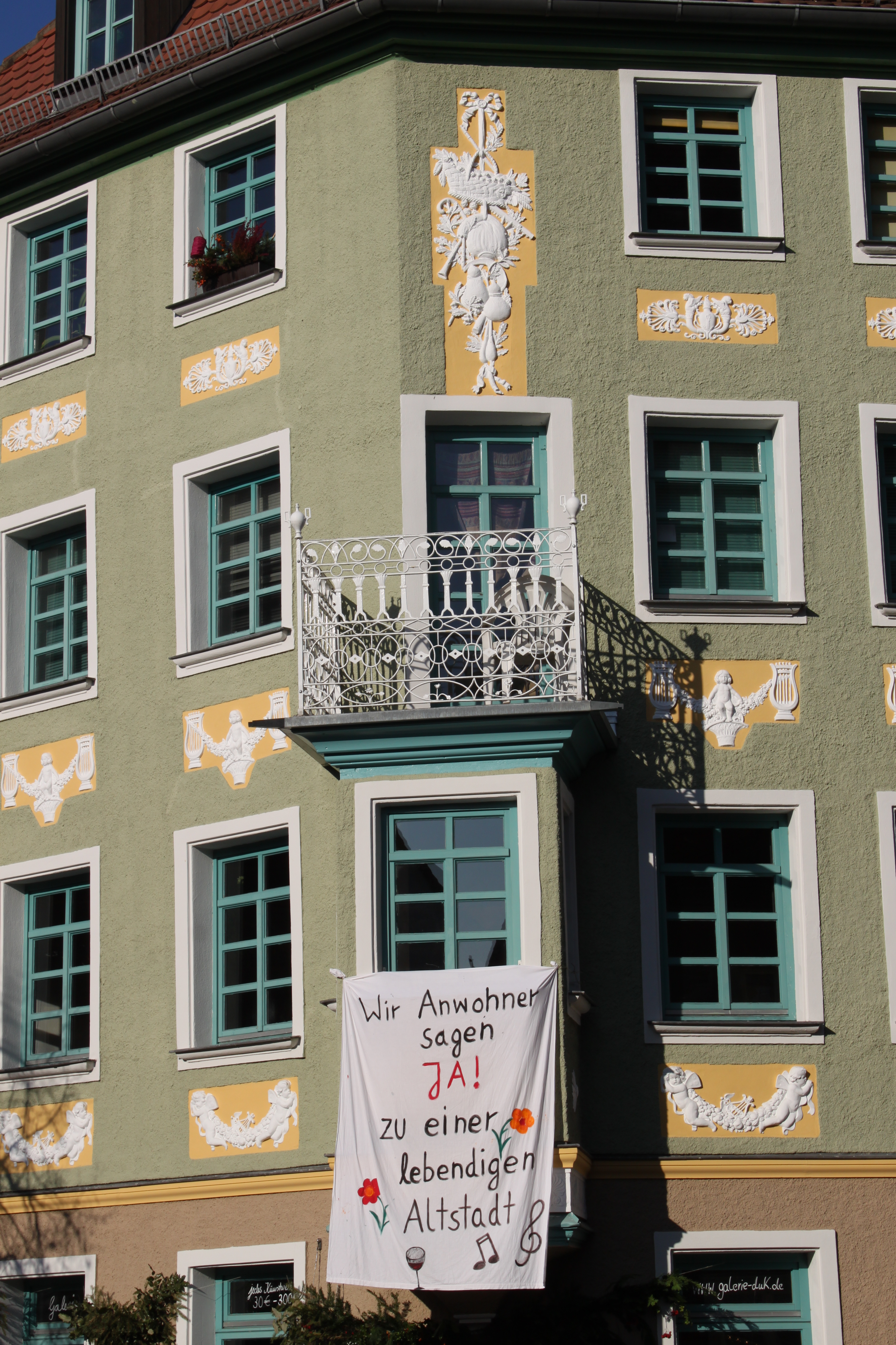 Im Rahmen der Auseinandersetzungen über die Gustavstraße zeigen Anwohner Flagge (Haus Gustavstraße 54)